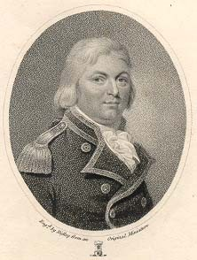 Philippe d'Auvergne, prince de Bouillon (1754-1816), gouverneur de Jersey